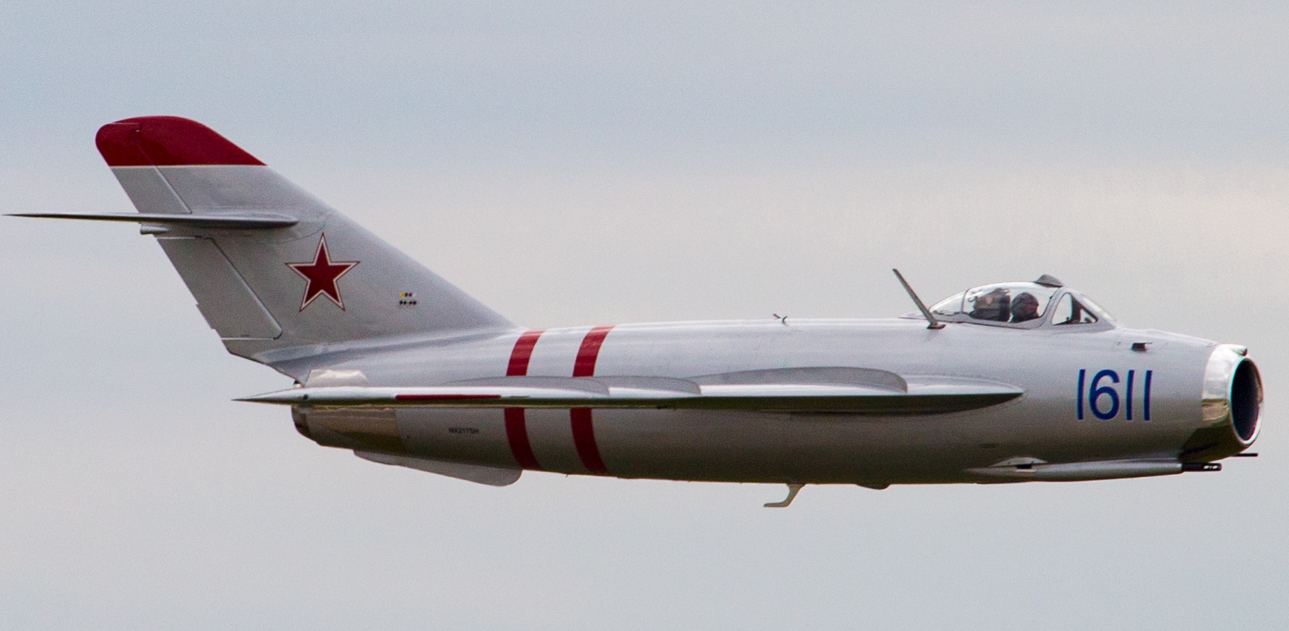 Wings Over Pittsburgh